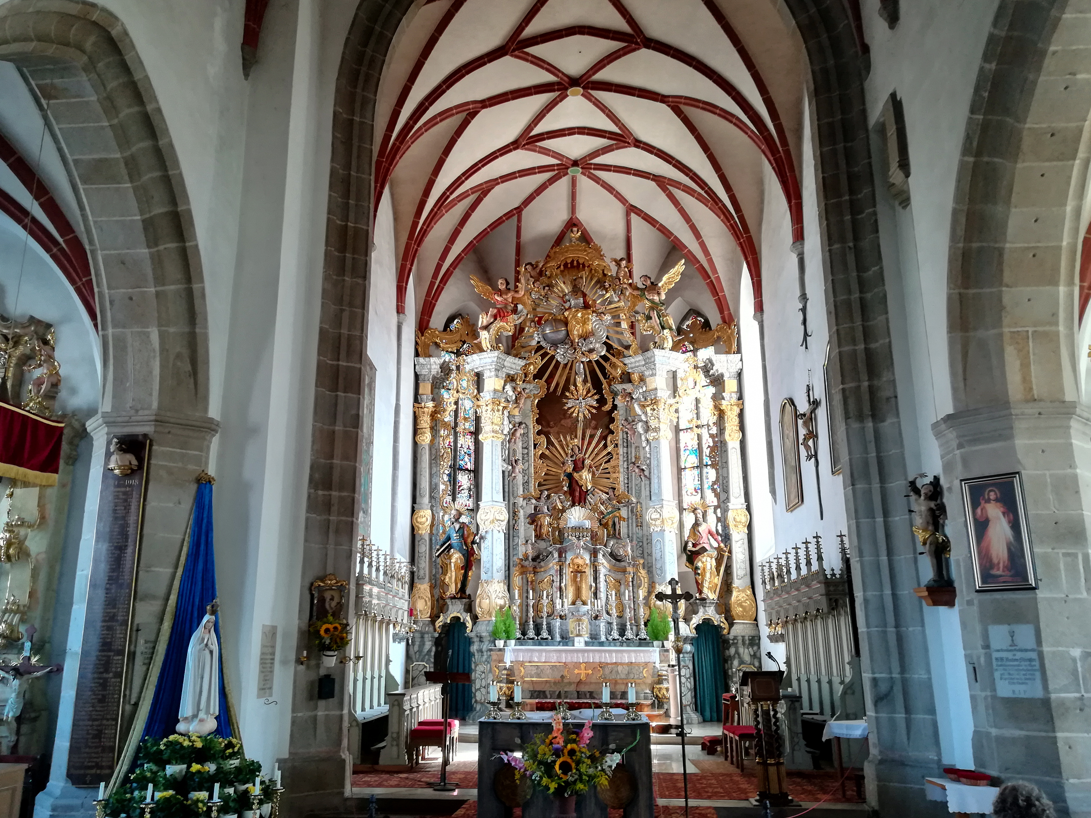 Die katholische Pfarrkirche Mariä Himmelfahrt ist ein denkmalgeschütztes Kirchengebäude in Chammünster.